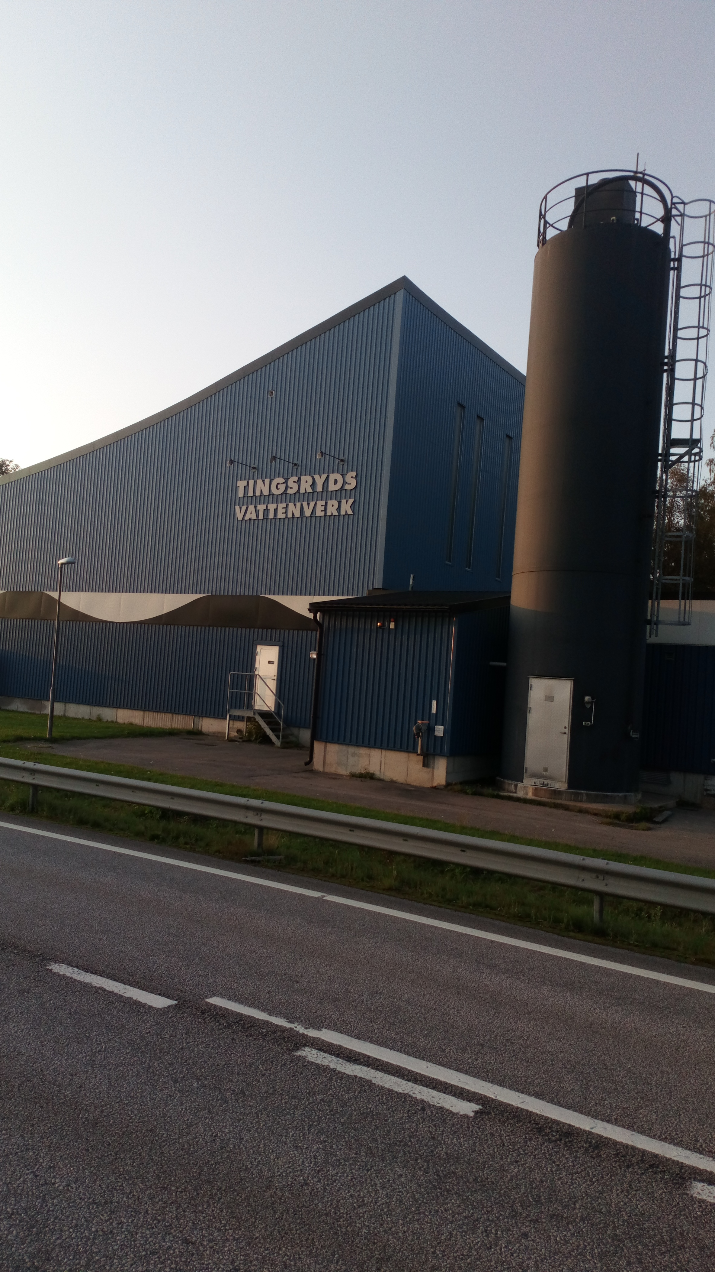 Tingsryds vattenverk i Hensmåla by. Foto 21 augusti 2019 . Vattenverket förser drygt 5000 månniskor med vatten.